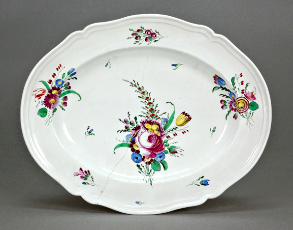 Vassoi con decoro a mazzetti di fiori. Ginori a Doccia terzo quarto del XVIII secolo.